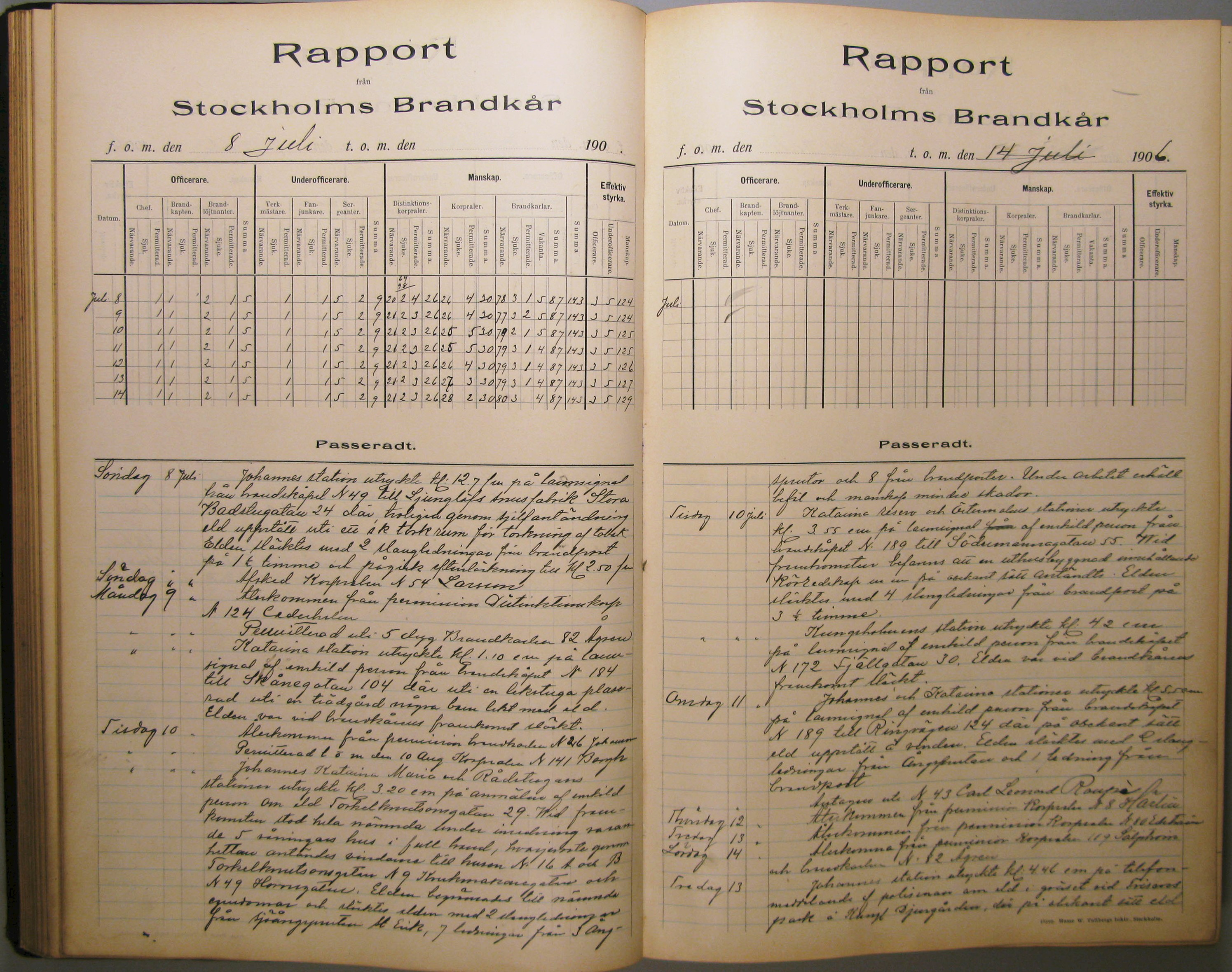 Exempel på en veckorapport från Stockholms brandförsvar. Brand på Torkel Knutsonsgatan 29 den 10 juli 1906